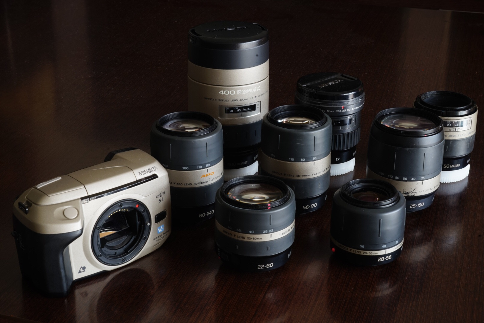 美能达 Vectis S-1 及V卡口镜头群。